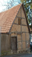 Wirtschaftsgebäude des Mittelalters in Homberg/Efze, selbst fotografiert